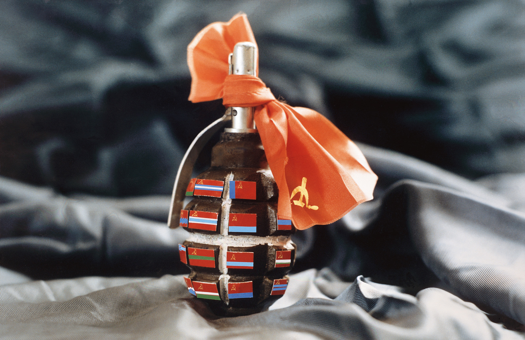 БЕЗ НАЗВАНИЯ. Постановочное фото, изоколлаж, 60х90 см. 1989 г